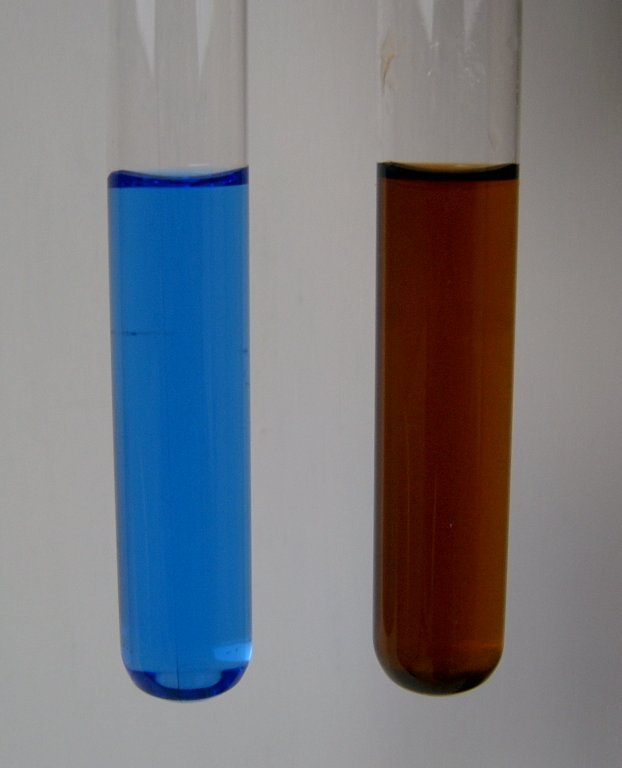 Amminokomplexe von Cu(II)- (links) und Cobalt(III)-ionen